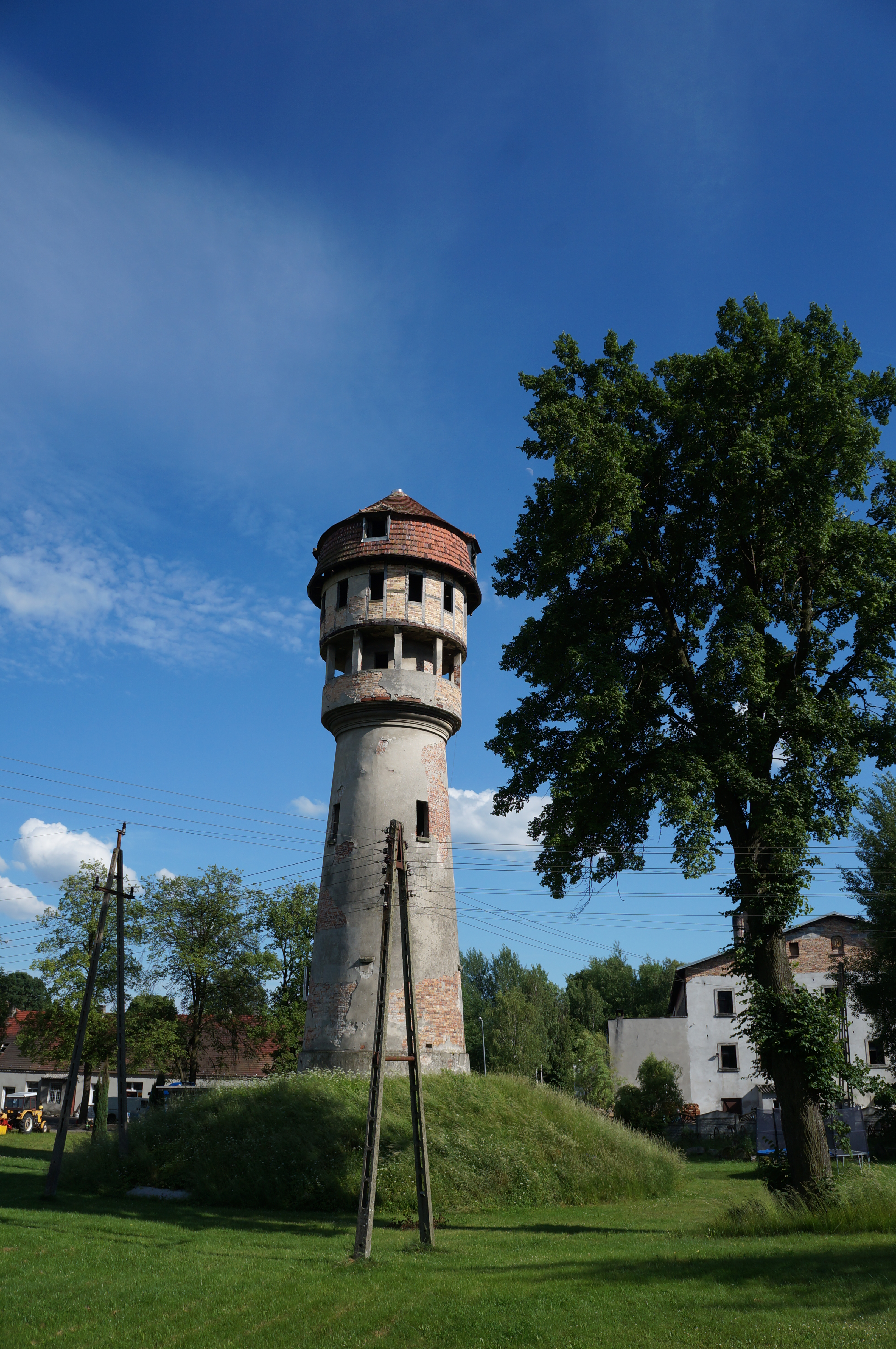 Nieużywana wieża ciśnień. Parowa, gm. Osiecznica